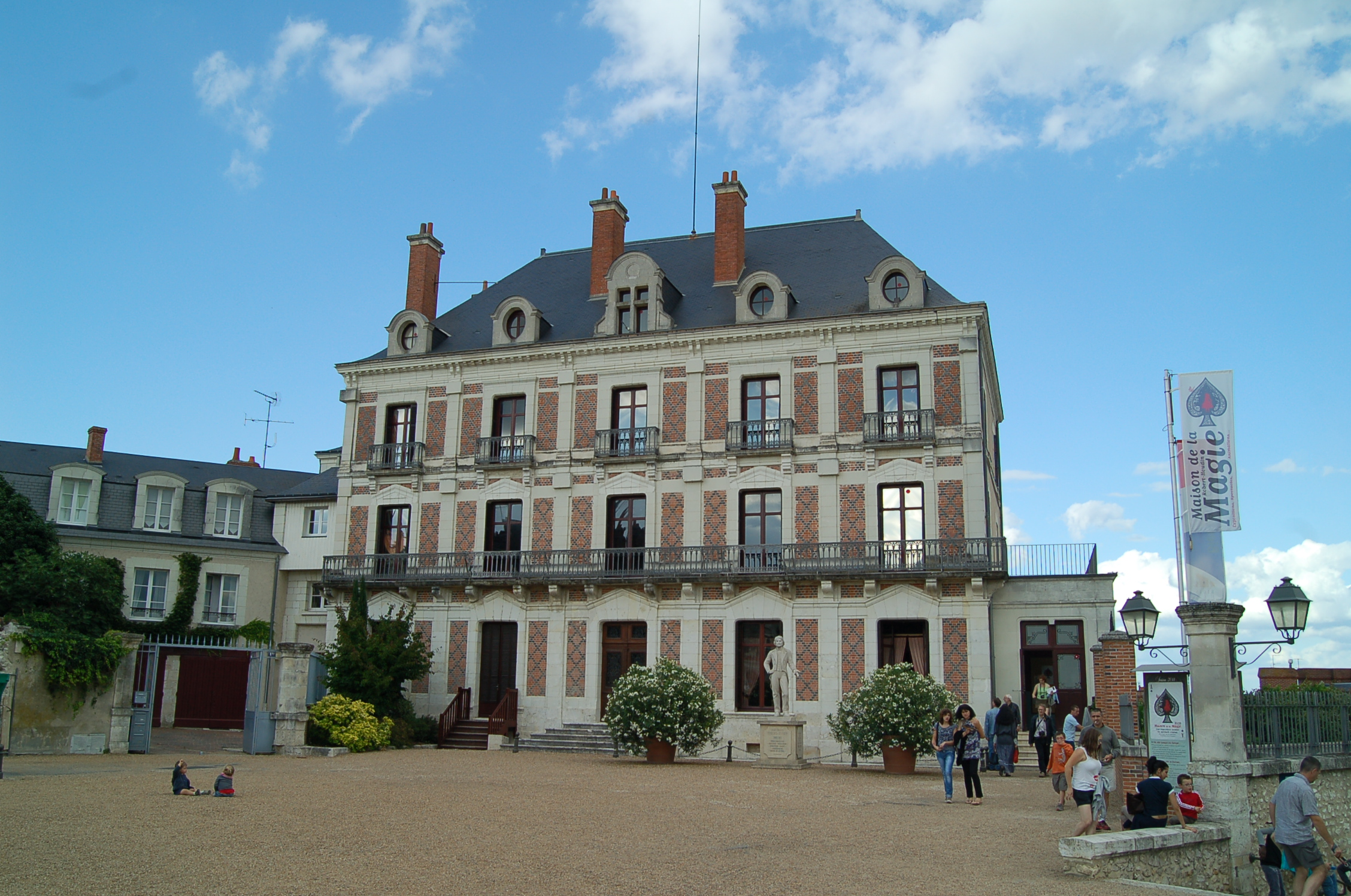 Maison de la magie, Blois 2011